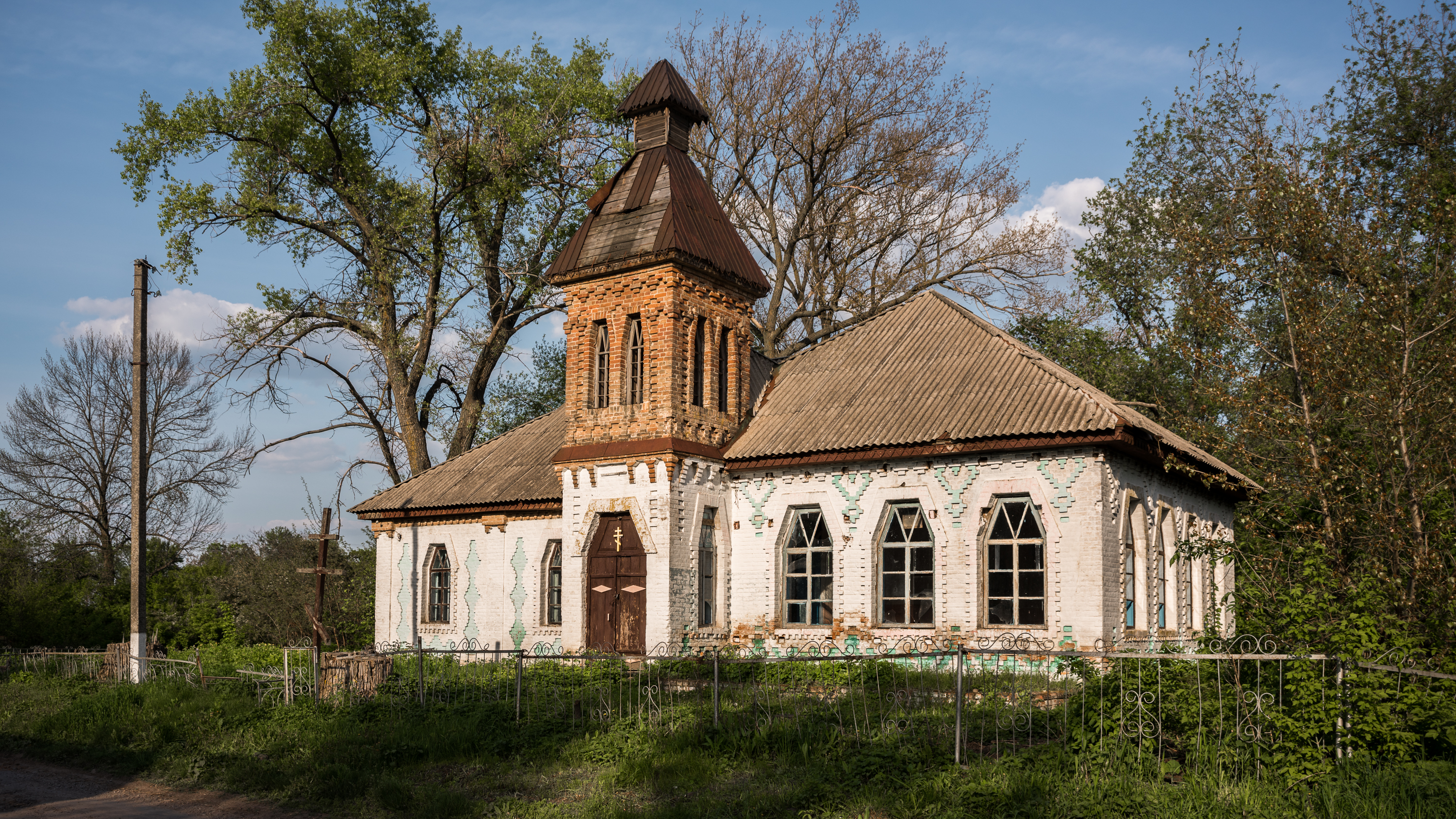 Однокомплектна земська школа в селі Макушиха Варвинського району Чернігівської області. Стиль - український архітектурний модерн. Архітектор Опанас Сластьон.